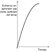 Curva de aprendizaje